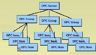 modelo de un OPC